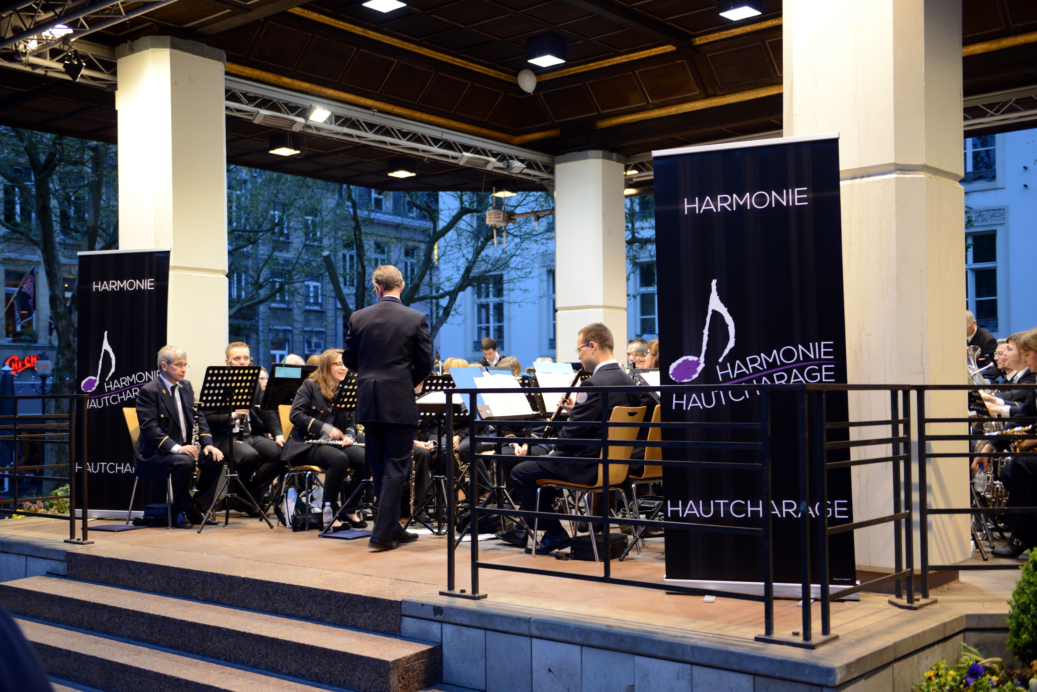 D'Harmonie Hautcharage gëtt e Concert op der Plëss.